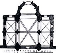 Plan de la Chapelle du Prieuré Saint Gabriel à Saint Gabriel Brécy. Dessin de l'Association culturelle.